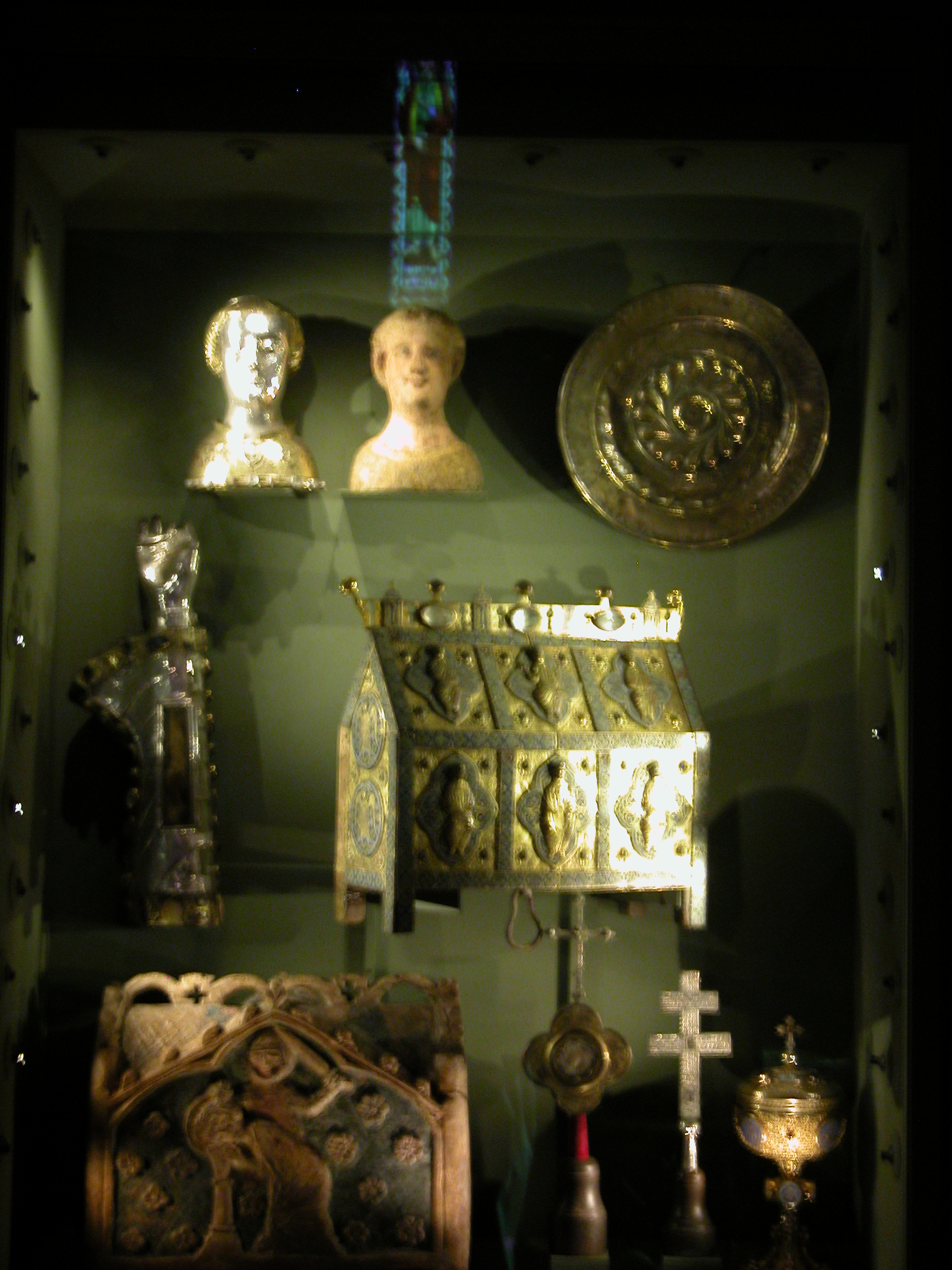 Eglise de Saint-Marcel (Indre) - Le Trésor